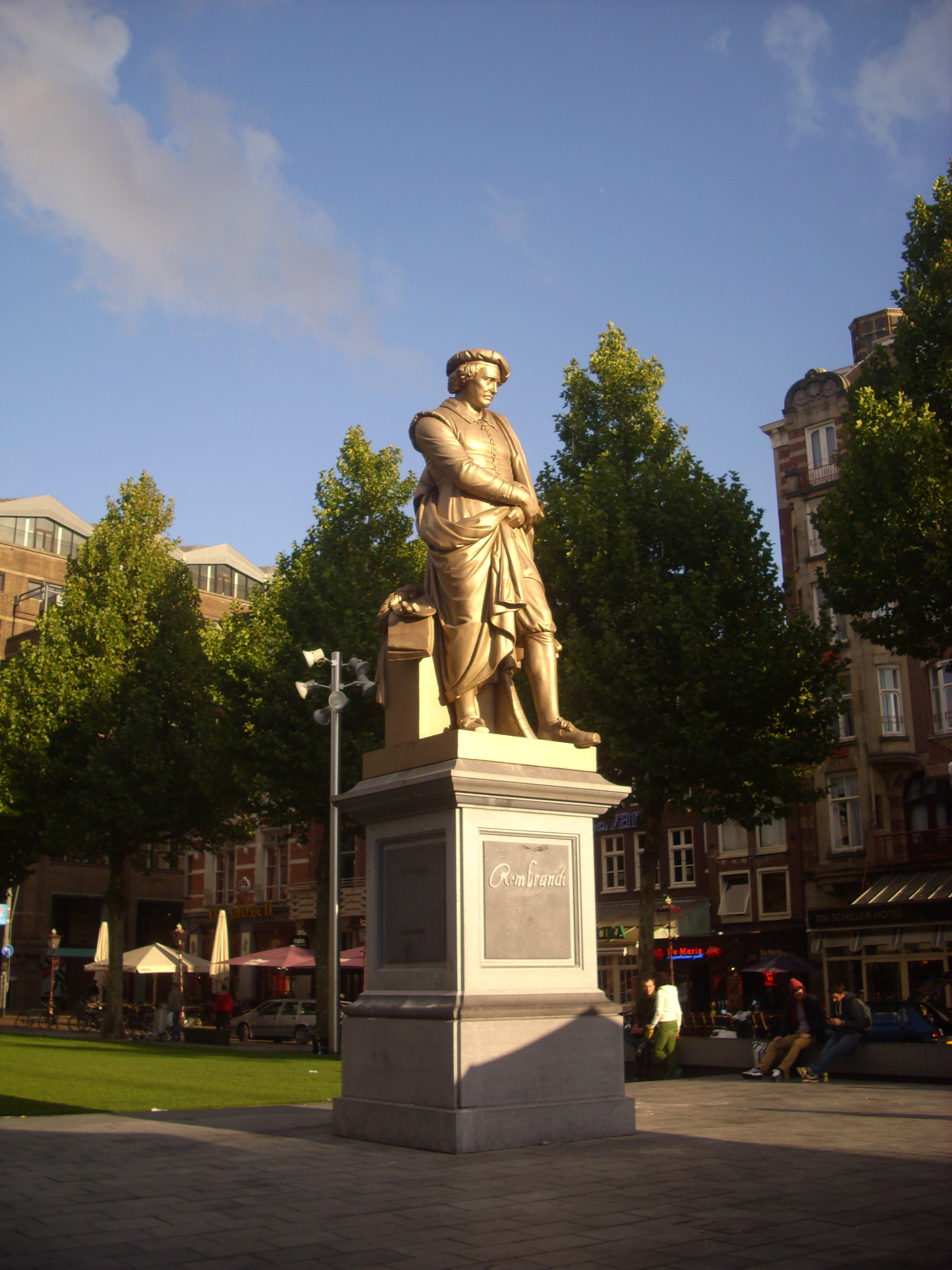 Rembrandtdenkmal, Rembrandtplein, Amsterdam